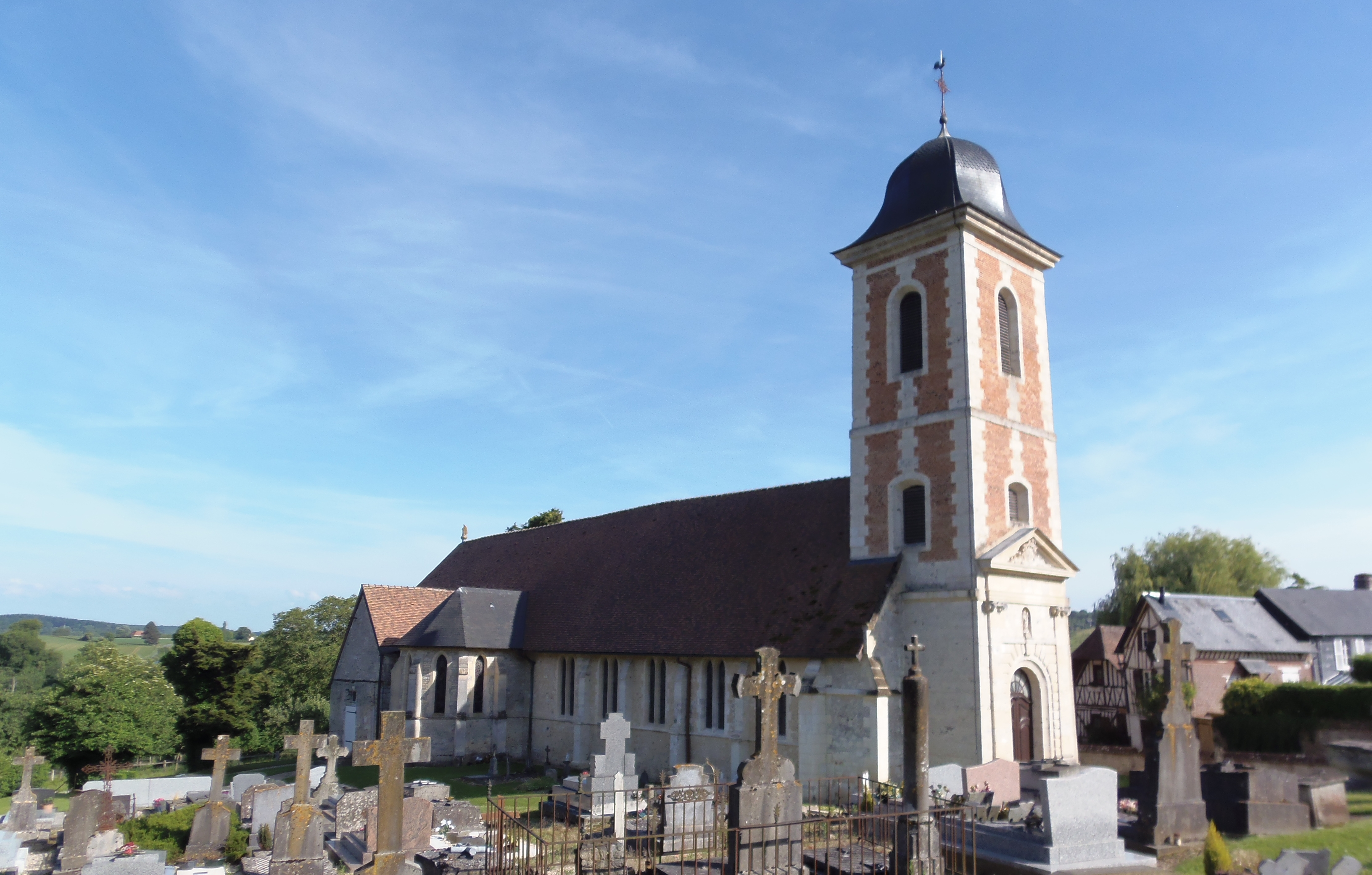 Le Mesnil-sur-Blangy. (Normandie, France). L'église Notre-Dame.